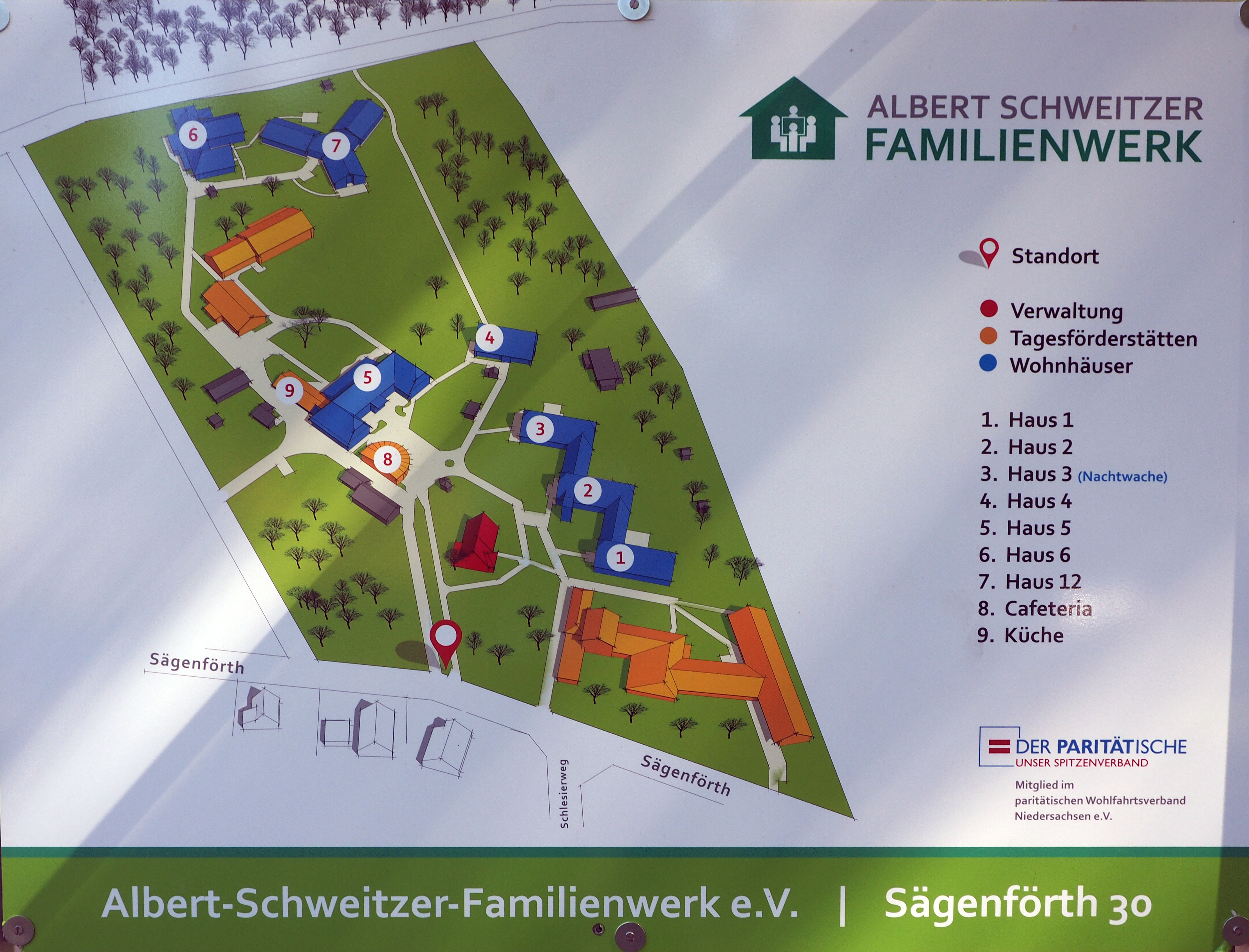 Geländeplan des Albert-Schweitzer-Familienwerks, Hermannsburg, Germany